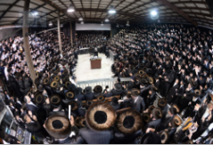 חסידי נדבורנה בהכנסת ספר תורה לבית מדרשם